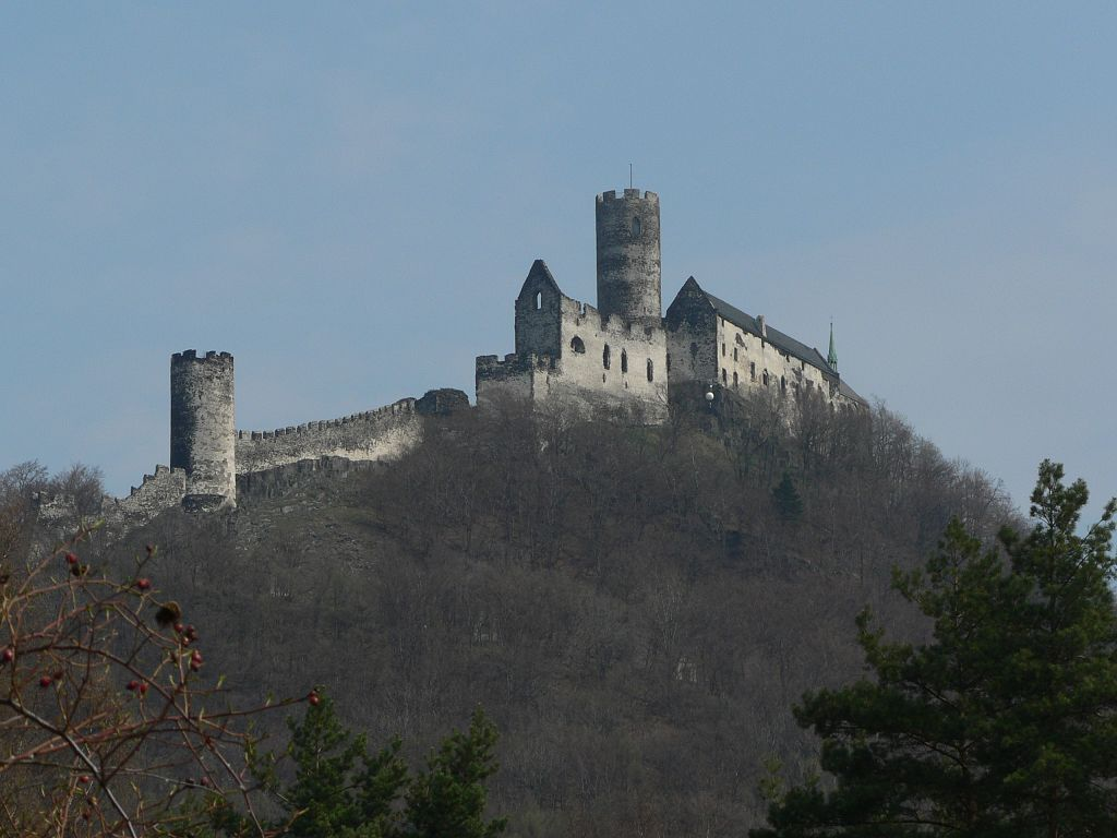 Bezděz castle, Czech republic